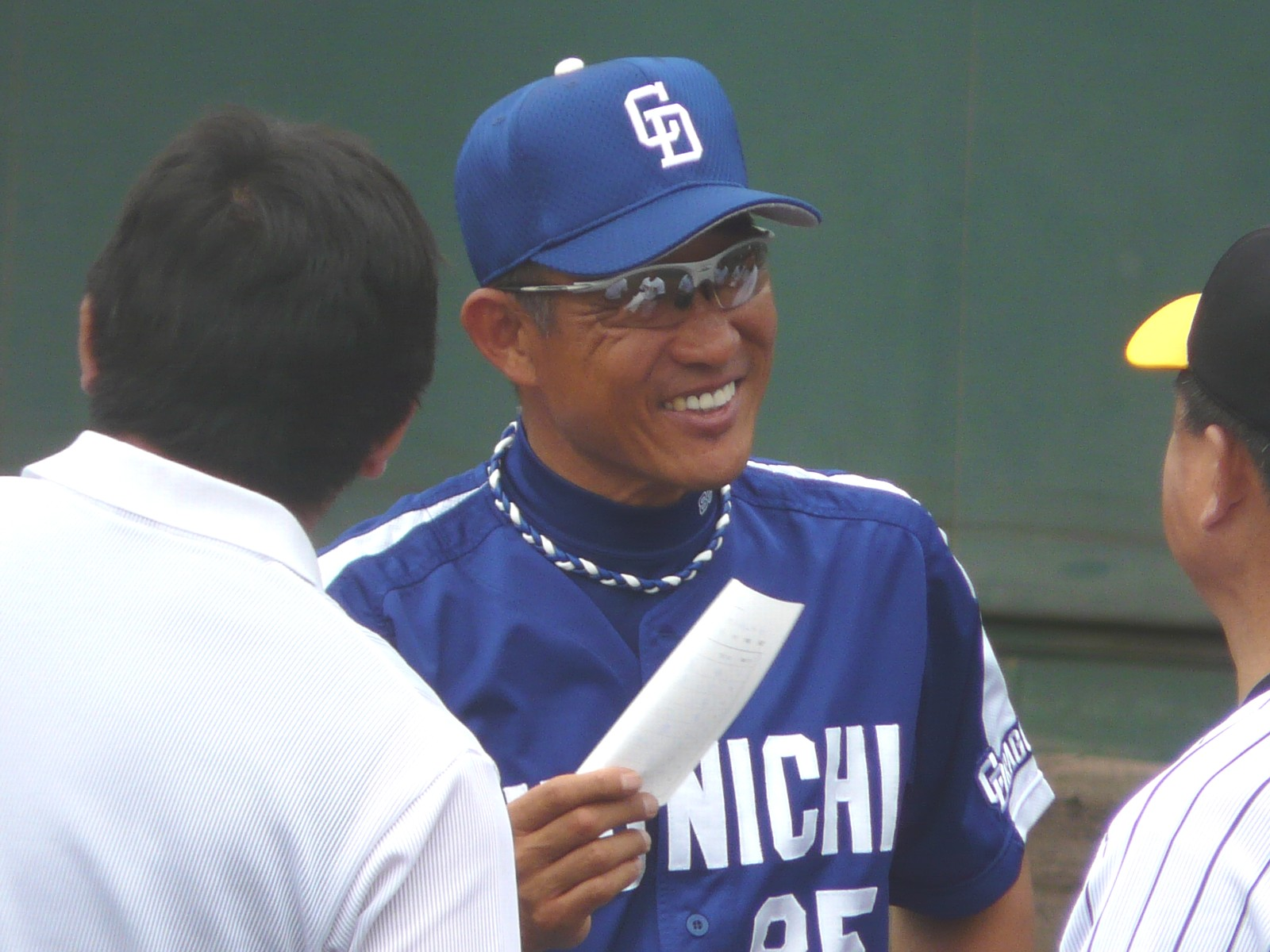 Copied from 画像:CD-Hatsuhiko-Tsuji.jpg: "辻発彦"